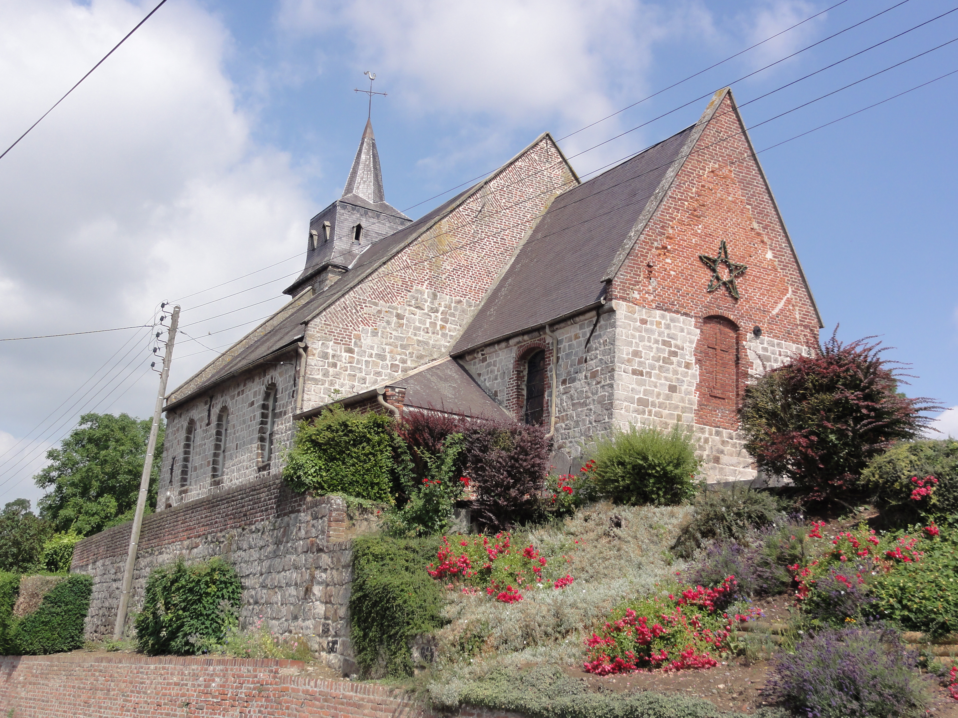 Sommaing (Nord, Fr) église